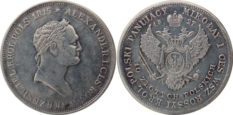 10 zlotych polskich 1827 IB - kopia